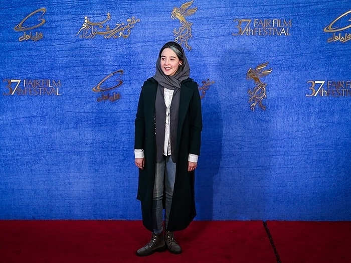 به‌آفرید غفاریان در سی و هفتمین دوره جشنواره فیلم فجر